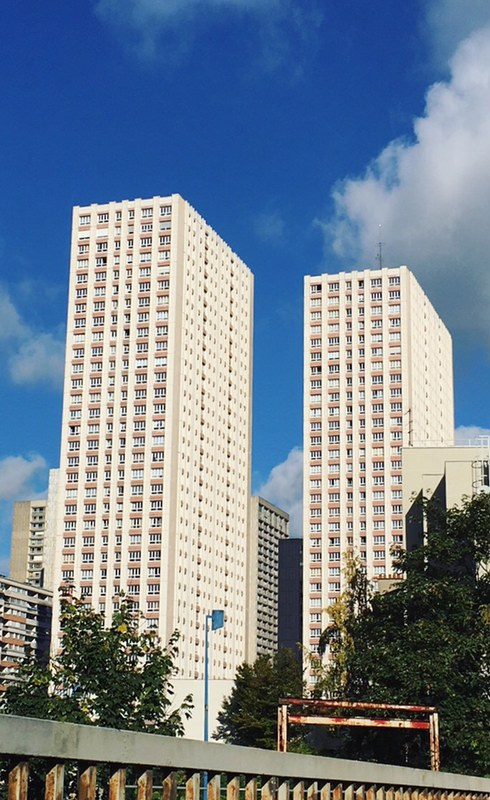 Logements sociaux situés dans le XIIIème arrondissement